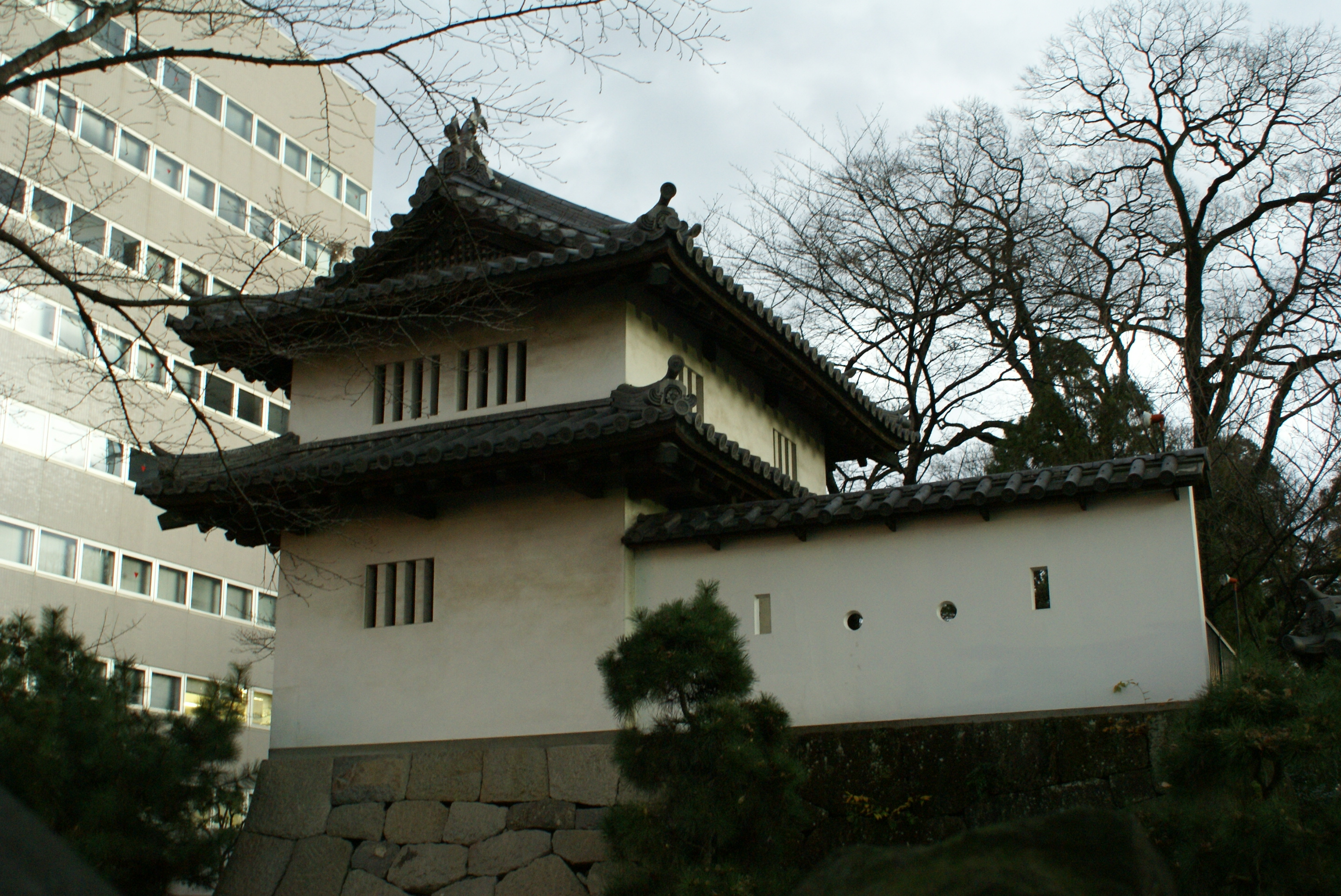 高崎城乾櫓